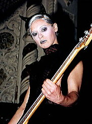 es una imagen tomada en concierto cerrado de los smashing pumpking